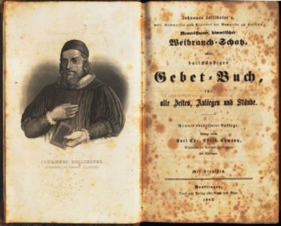 Johannes Zollikofer und Karl Christian Eberhard Ehmann: Johannes Zollikofer's , Neueröffneter, himmlischer Weihrauch-Schatz, oder vollständiges Gebet-Buch, für alle Zeiten, Anliegen und Stände. Neunte verbesserte Auflage, besorgt durch Karl Chr. Eberh. Ehmann, Pfarrer in Unter-Jesingen bei Tübingen. Johannes Zollikofer, Pfarrer und Kämmerer zu Herisau. 9. verb. Aufl., Reutlingen: Druck und Verlag von Rupp und Baur, 1865. 21 cm, Hardcover / Halbleder, 4 Bünde , 859 S., Mit Stahlstich, 1 Abb., Frontispiz